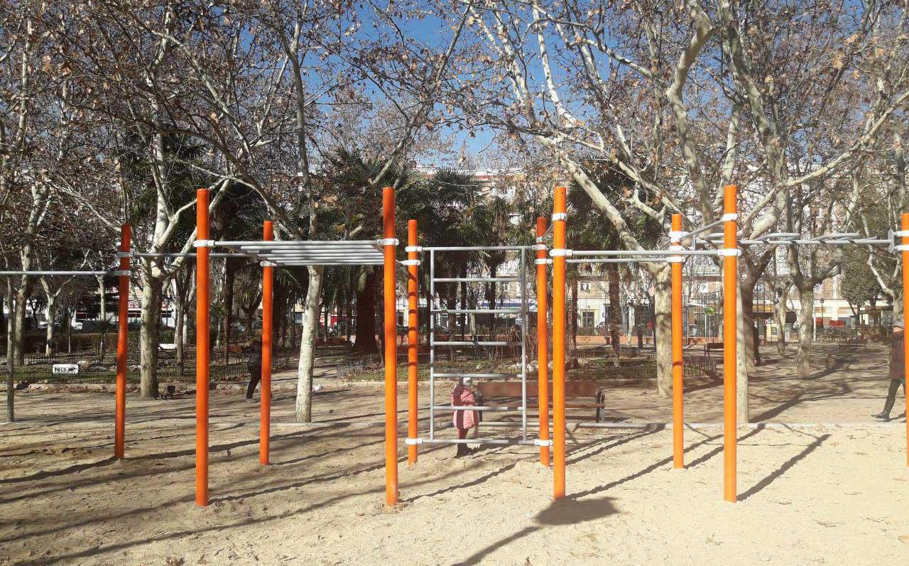 El vecindario de Ciudad Lineal tiene a su disposición dos nuevas instalaciones para practicar deporte al aire libre gracias a los Presupuestos Participativos de 2016. Se trata del Circuito de Street Workout y un Rocódromo, ambos situados en el Parque El Calero, y que hoy han sido abiertos al público por la concejala-presidenta de Ciudad Lineal, Yolanda Rodríguez, en presencia de la presidenta de la Federación Española de Street Workout y Calistenia, Mónica Sánchez y de miembros del Club de Montaña Pegaso. Para su construcción se han destinado un total de 111.000 euros.